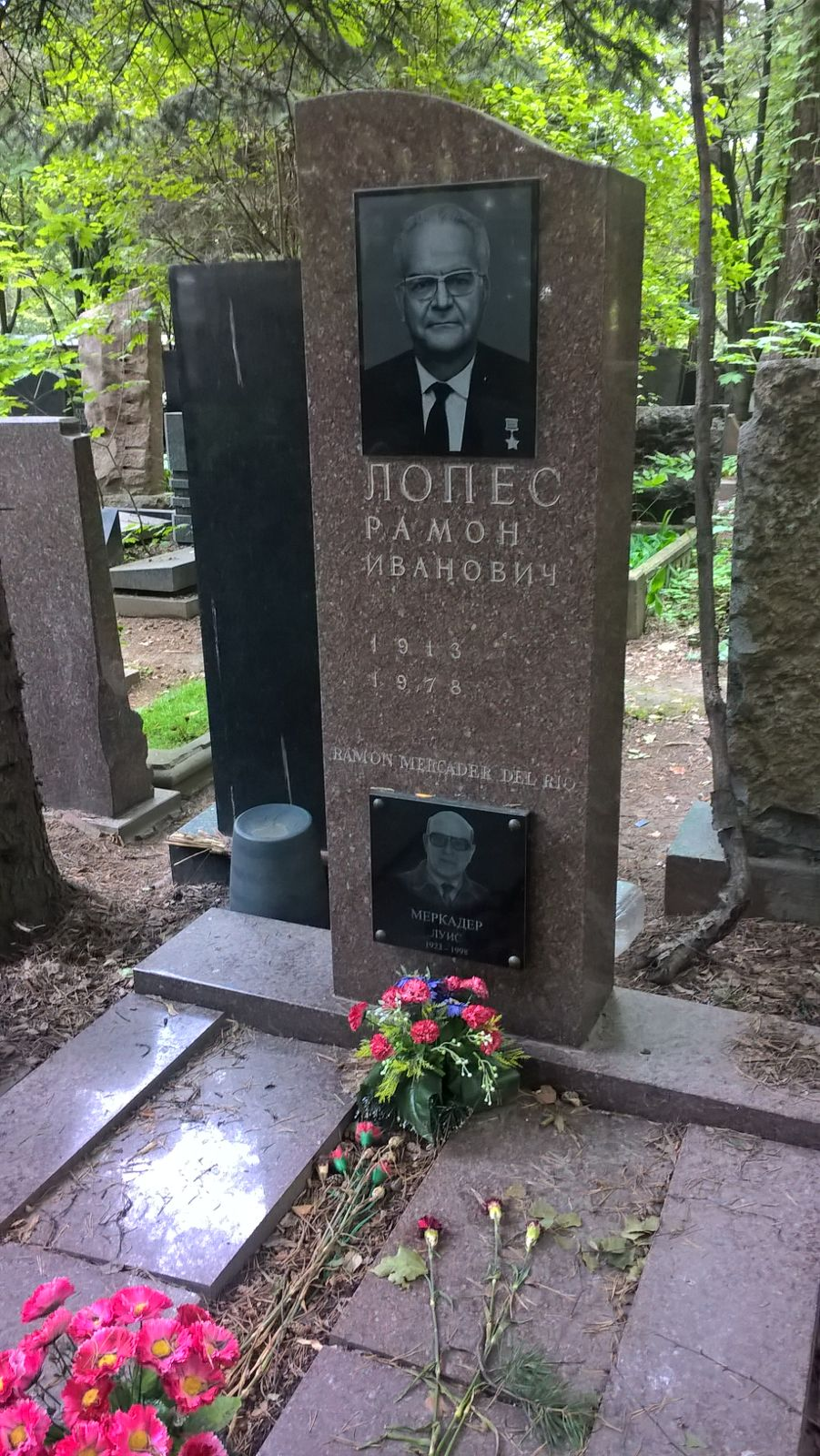 Tumba de Ramón Mercader en el cementerio de Kúntsevo en Moscú.